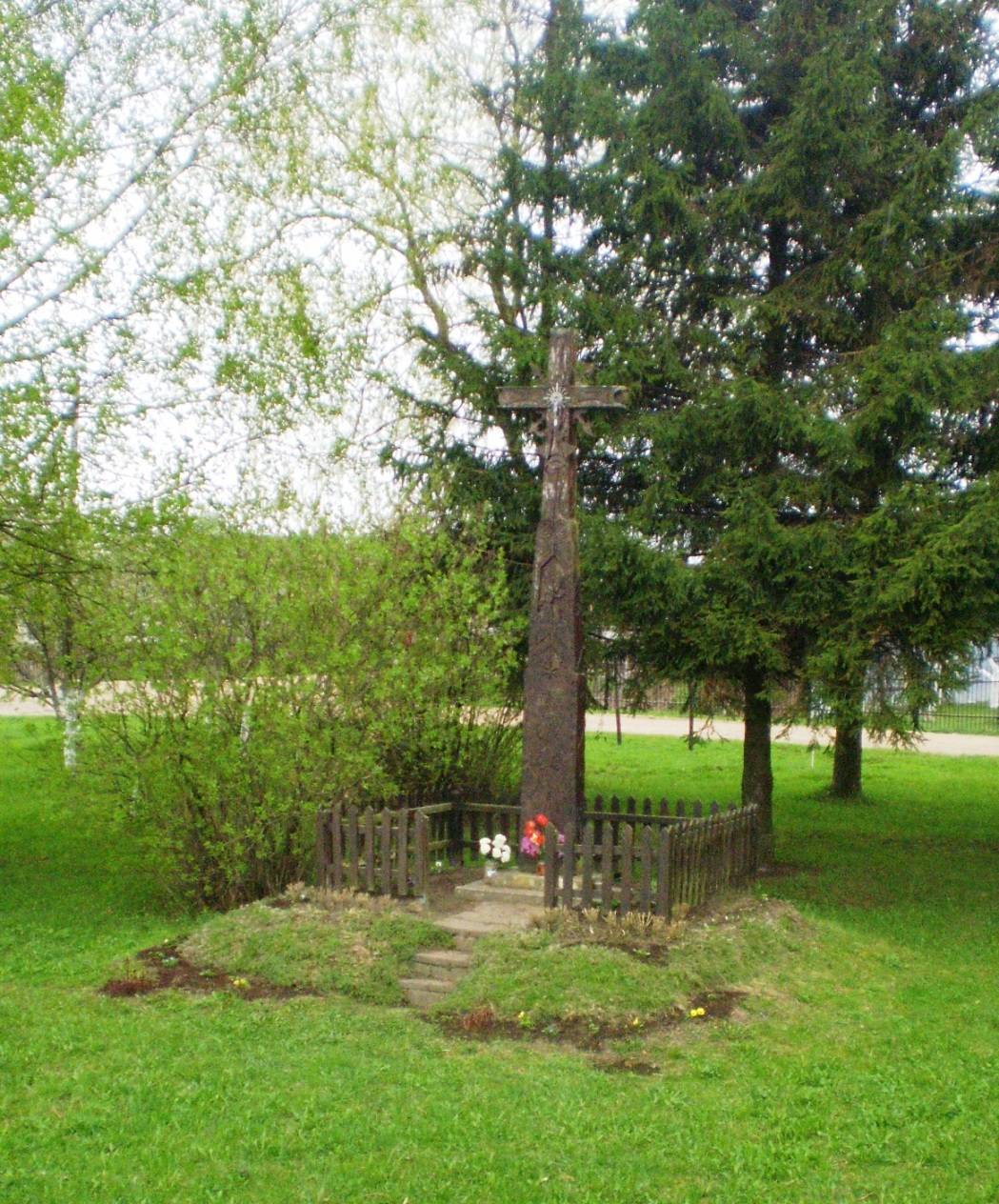 Kryžius, Vilainiai, Kėdainių raj.